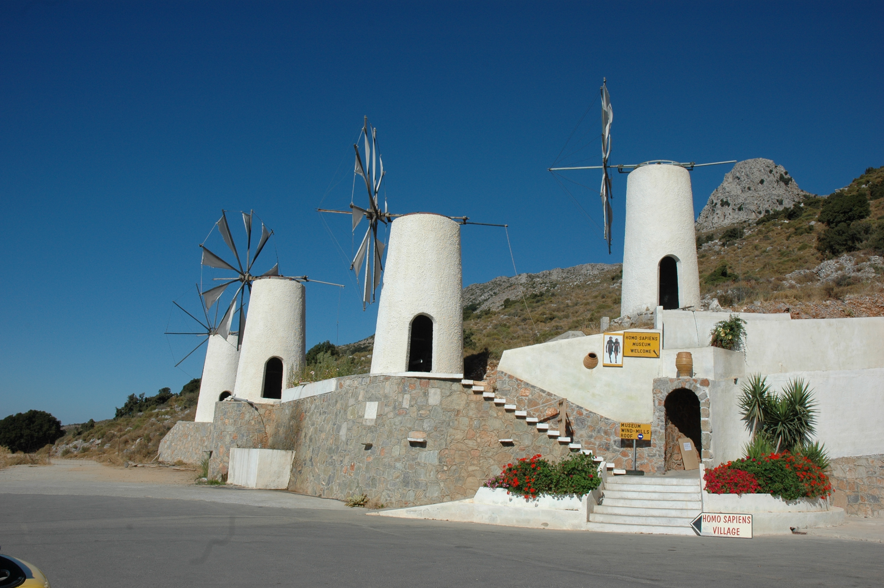 Restaurierte Windmuehlen auf Kreta / Windmills on Crete